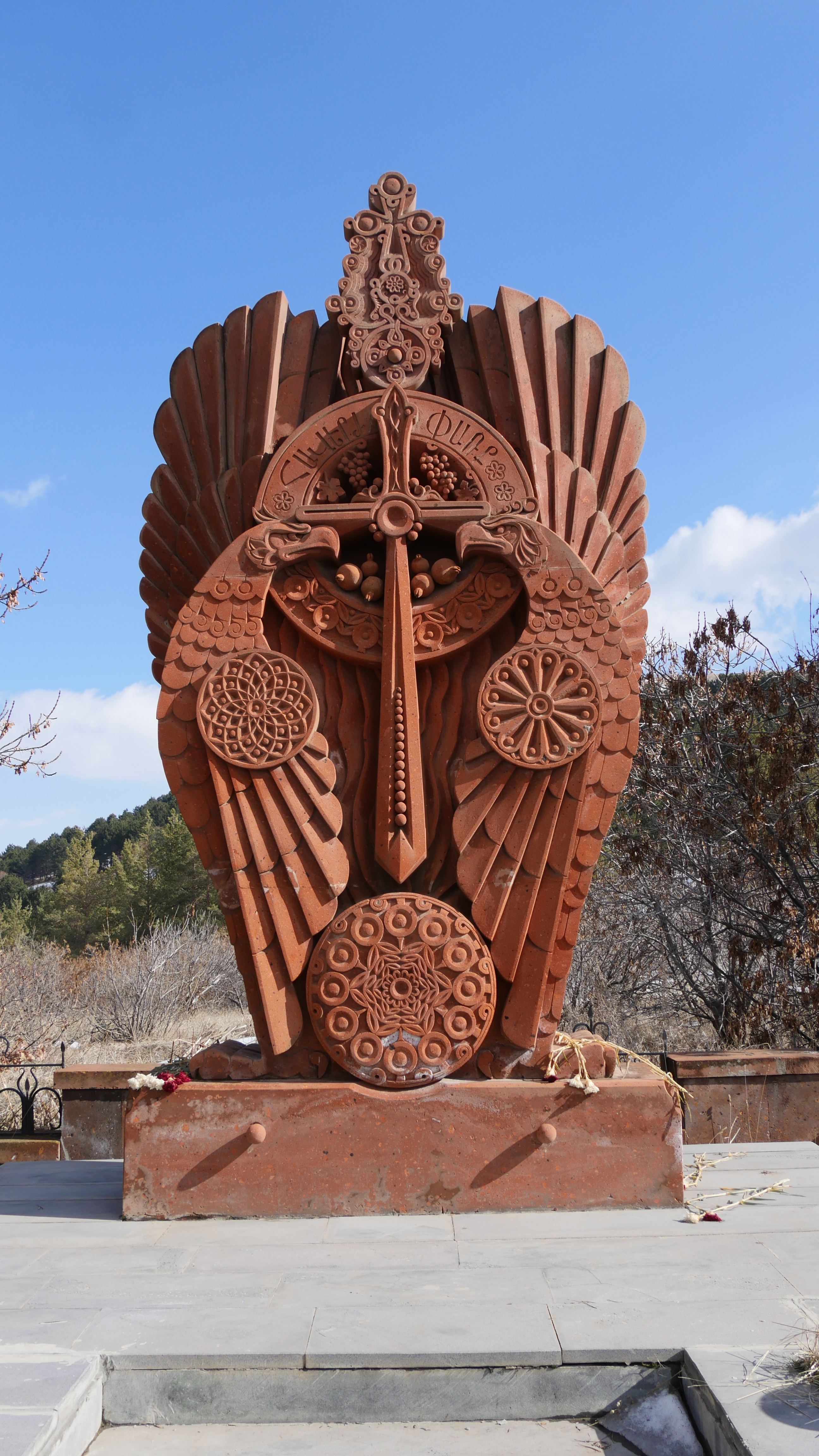 Հուշարձան պանթեոնում